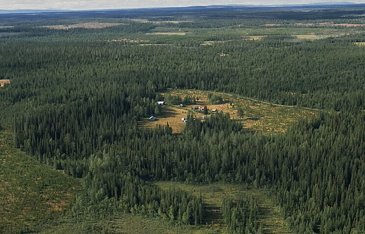 Motiv: Östra Svedjebodarna Nyckelord: Flygbilder, Riksintressen Kategori: FäbodsmiljöÖstra Svedjebodarna